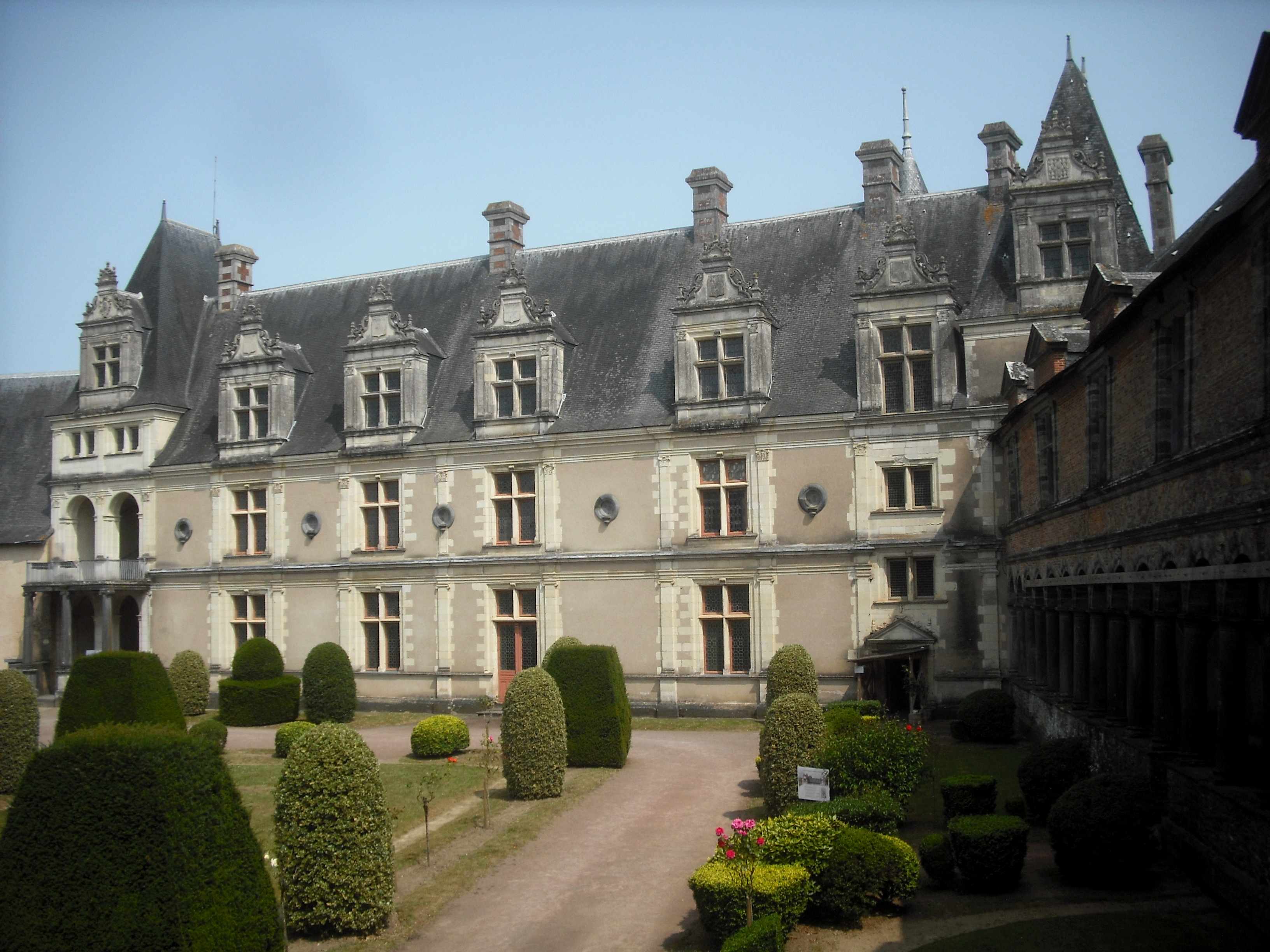 Façade du logis Jean de Laval, Château de Châteaubriant, Châteaubriant, France.